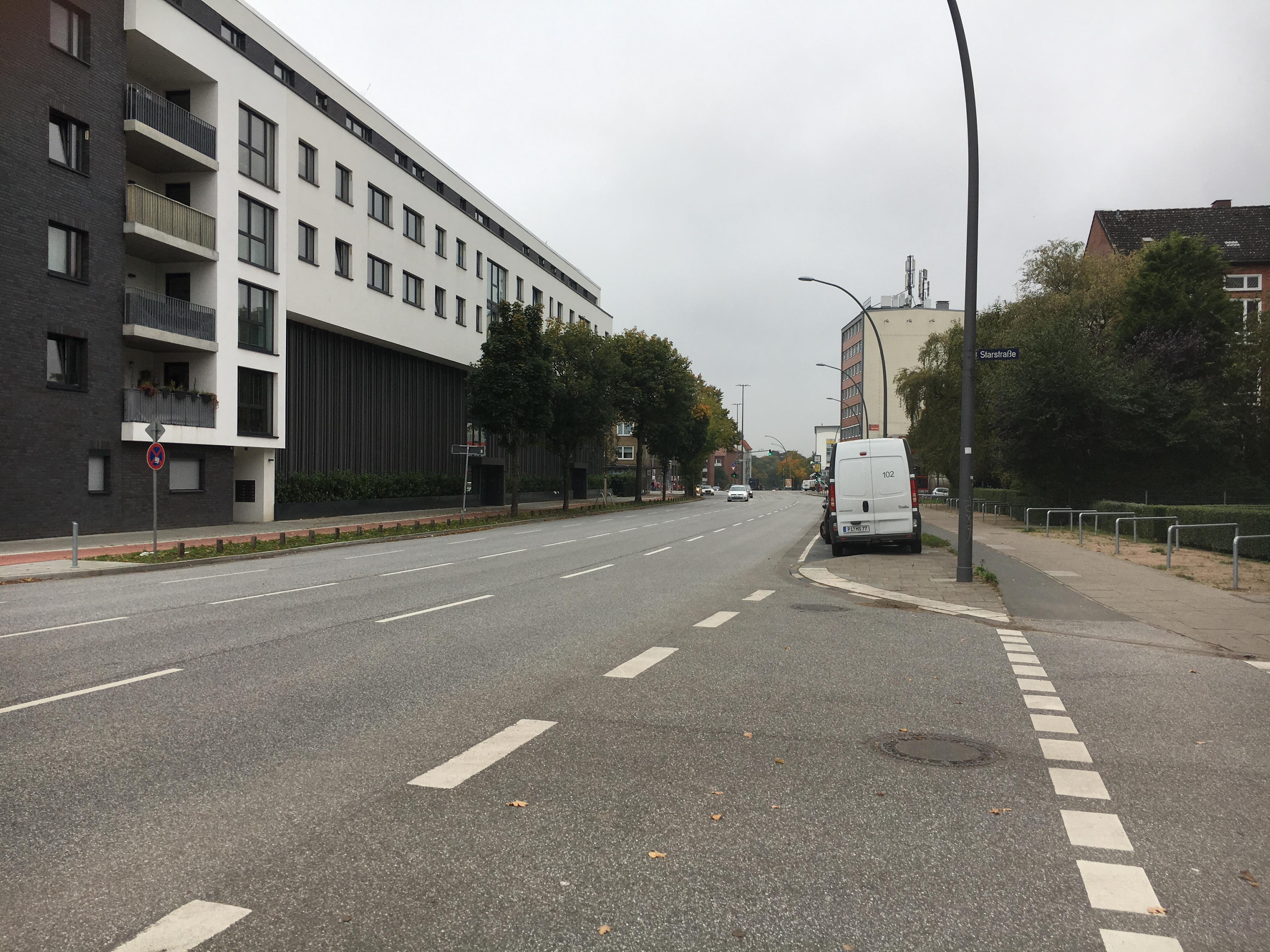 Drosselstraße, Blick in Richtung Fuhlsbüttler Straße